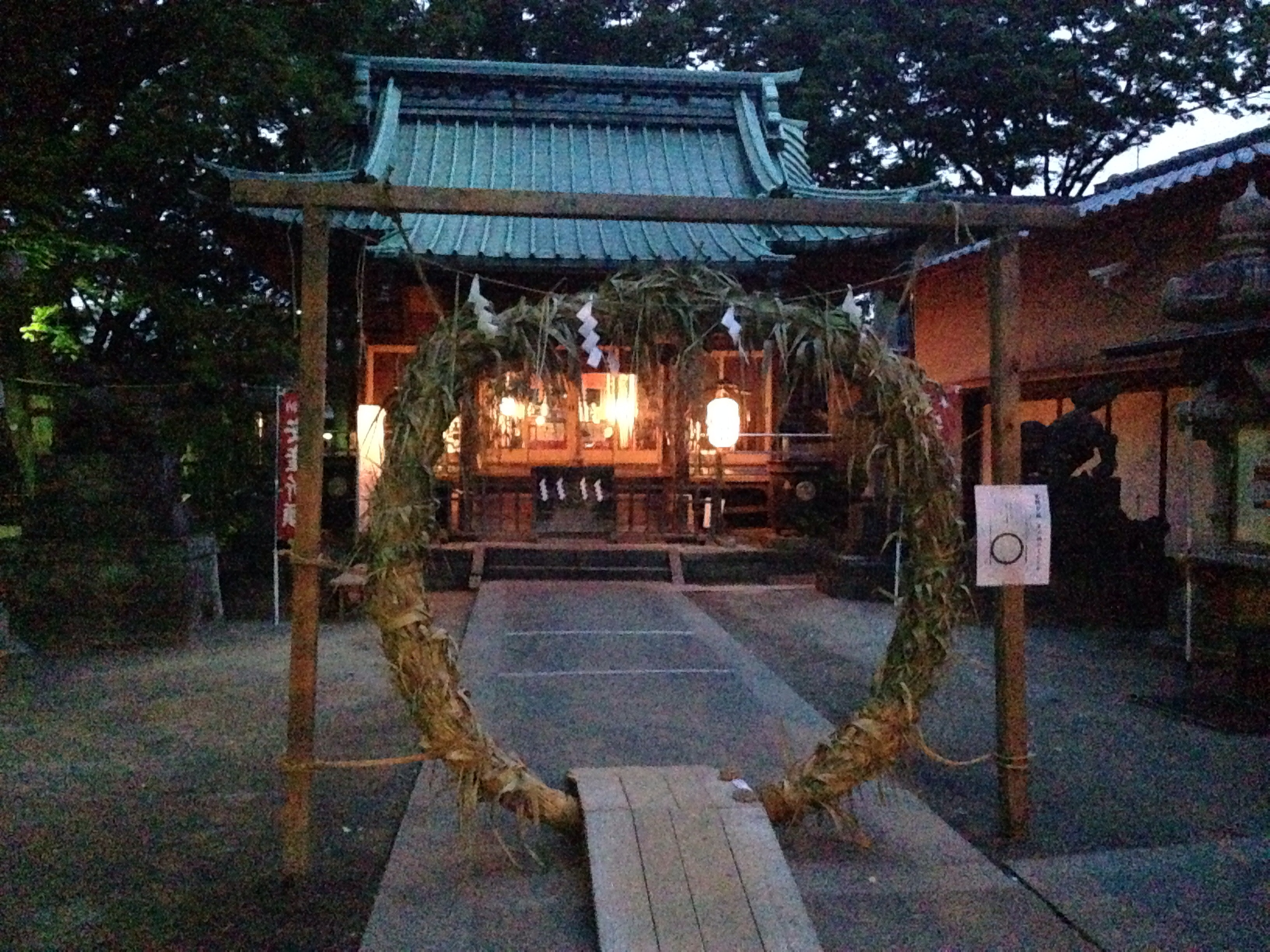 毎年6月30日に執り行われる「夏越大祓式」に向けて境内に設置される茅の輪（ちのわ）と拝殿。